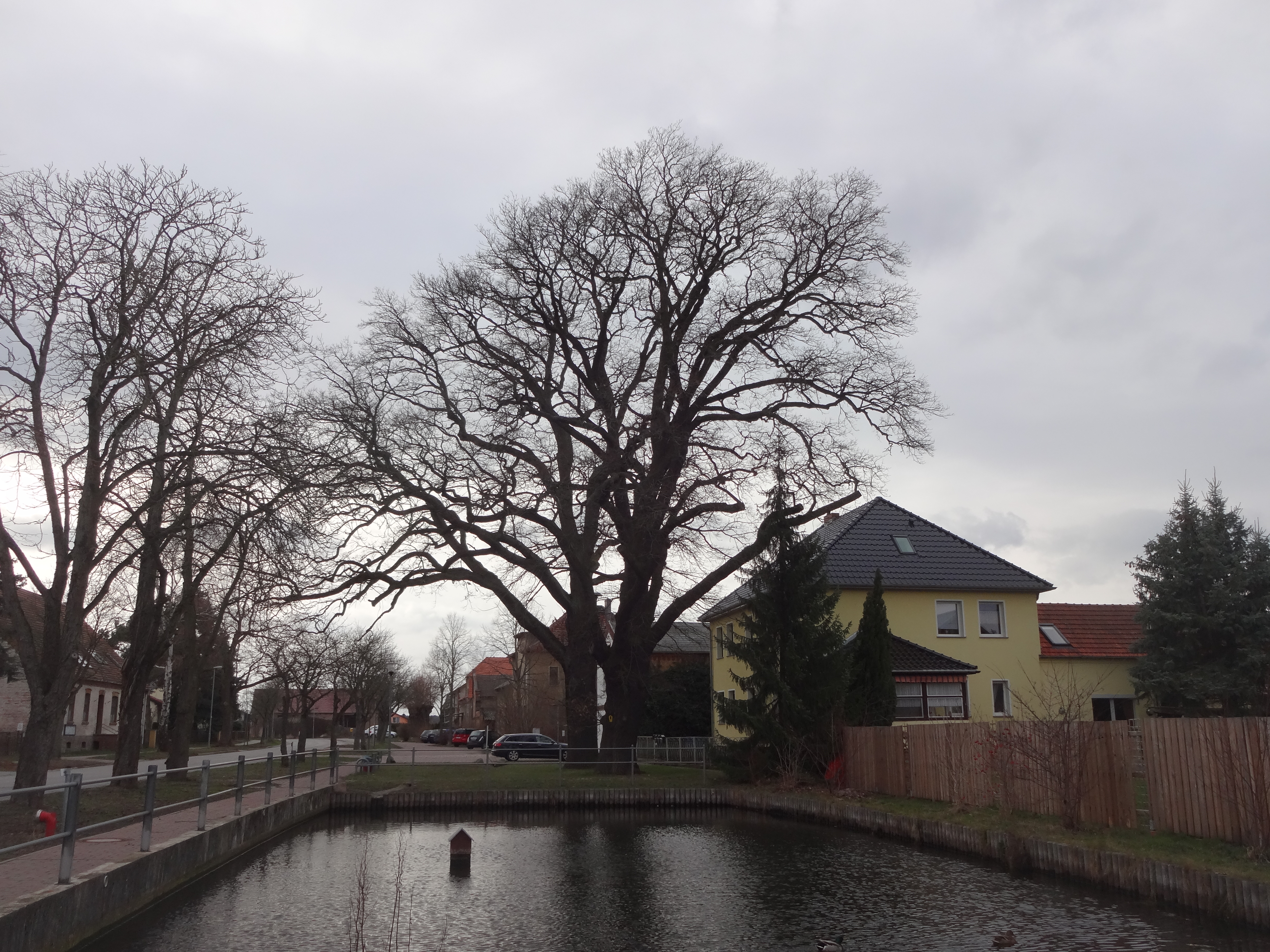 als Naturdenkmal geschützte 2 Trauben-Eichen am Dorfteich in Göhlsdorf